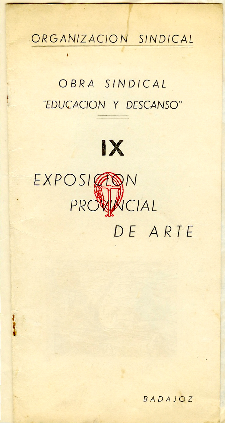 Catálogo de la "IX Exposición Provincial de Arte de la Obra Sindical de Educación y Descanso". Badajoz, julio de 1960. p. 1.